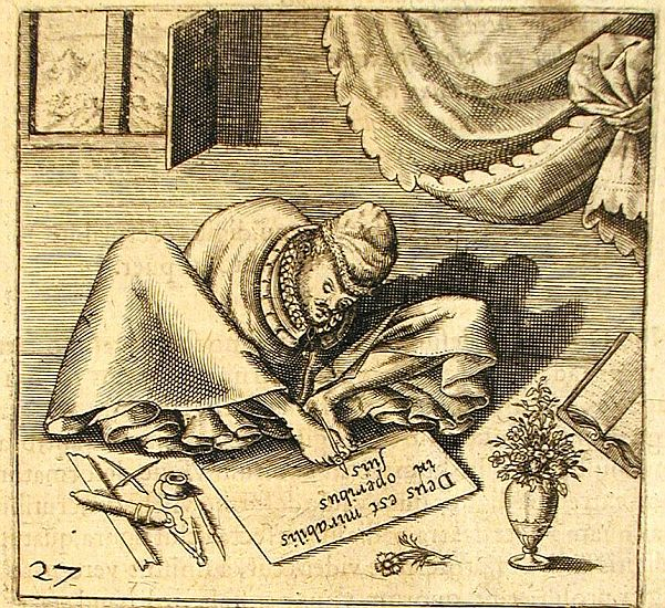 Thomas Schweicker in einem Buch von Johann-Georg Schenck